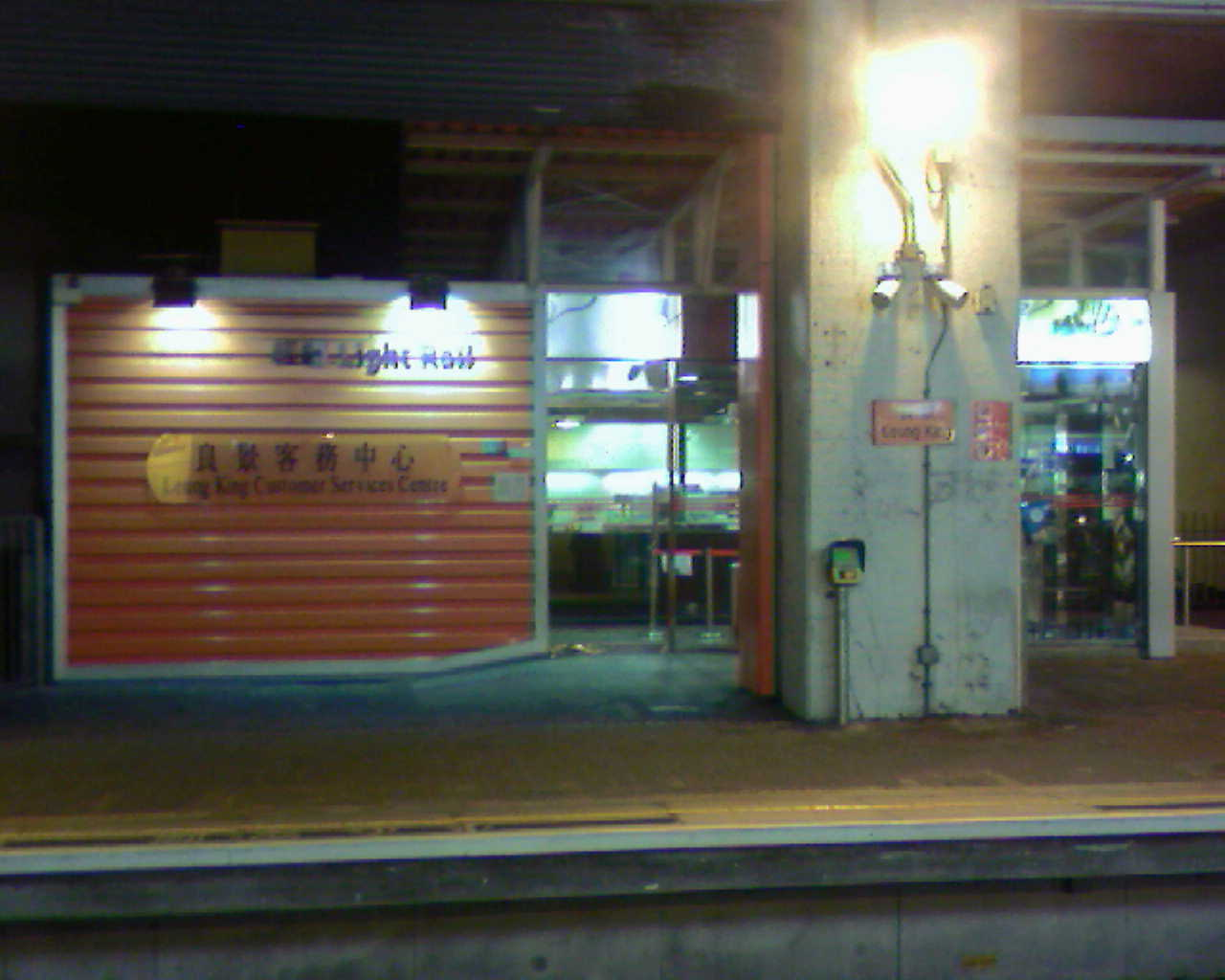 中文（香港）: 良景輕鐵客務中心。